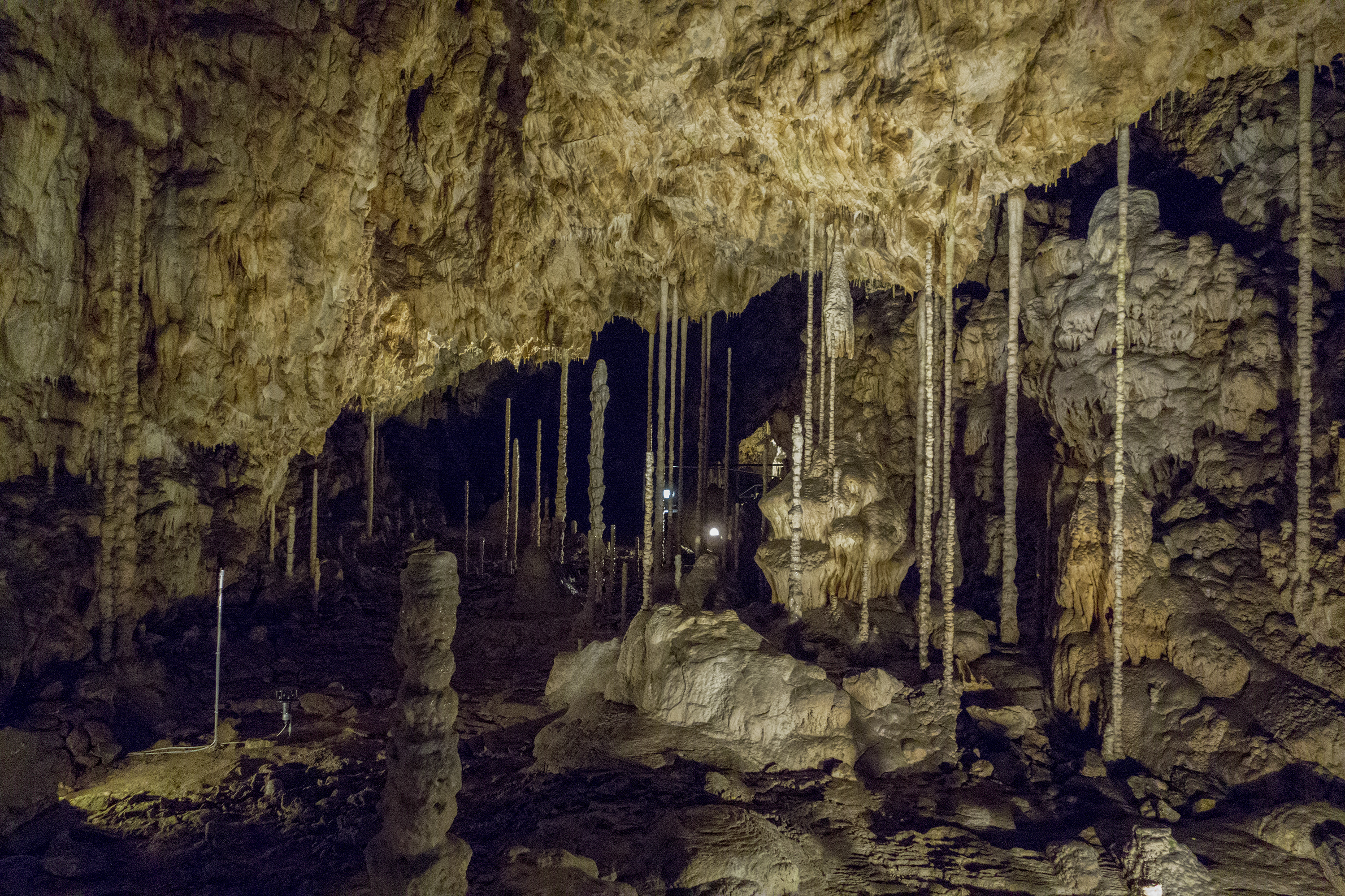 Česky: Kateřinská jeskyně - "Bambusový lesík"